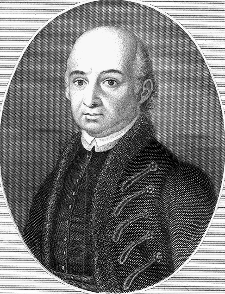 Virág Benedek (1754-1830) költő, író, pedagógus, műfordító rézmetszet portré 18-19. sz.